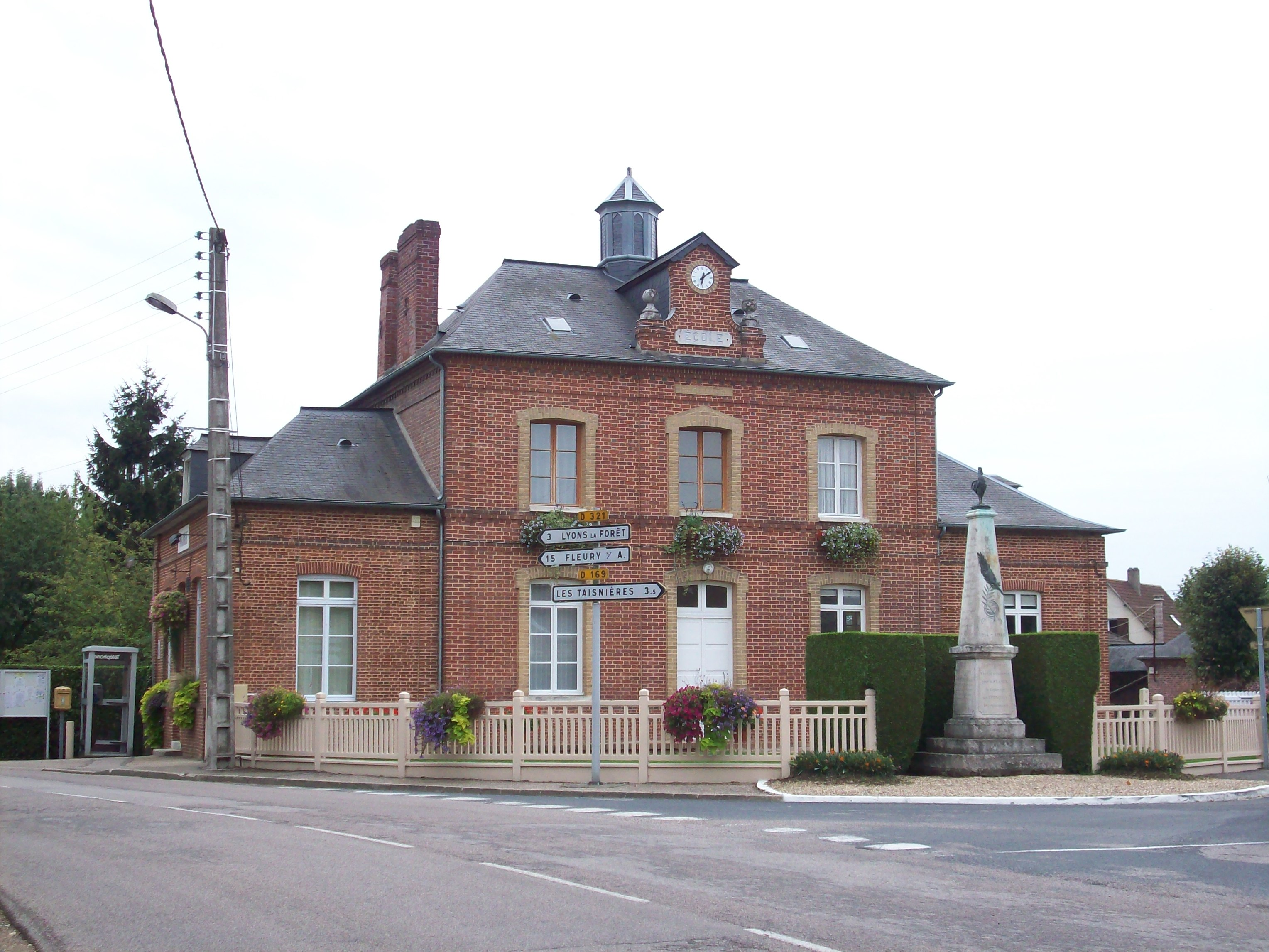 Mairie-école du Tronquay et sur le devant le monument aux morts de la commune.